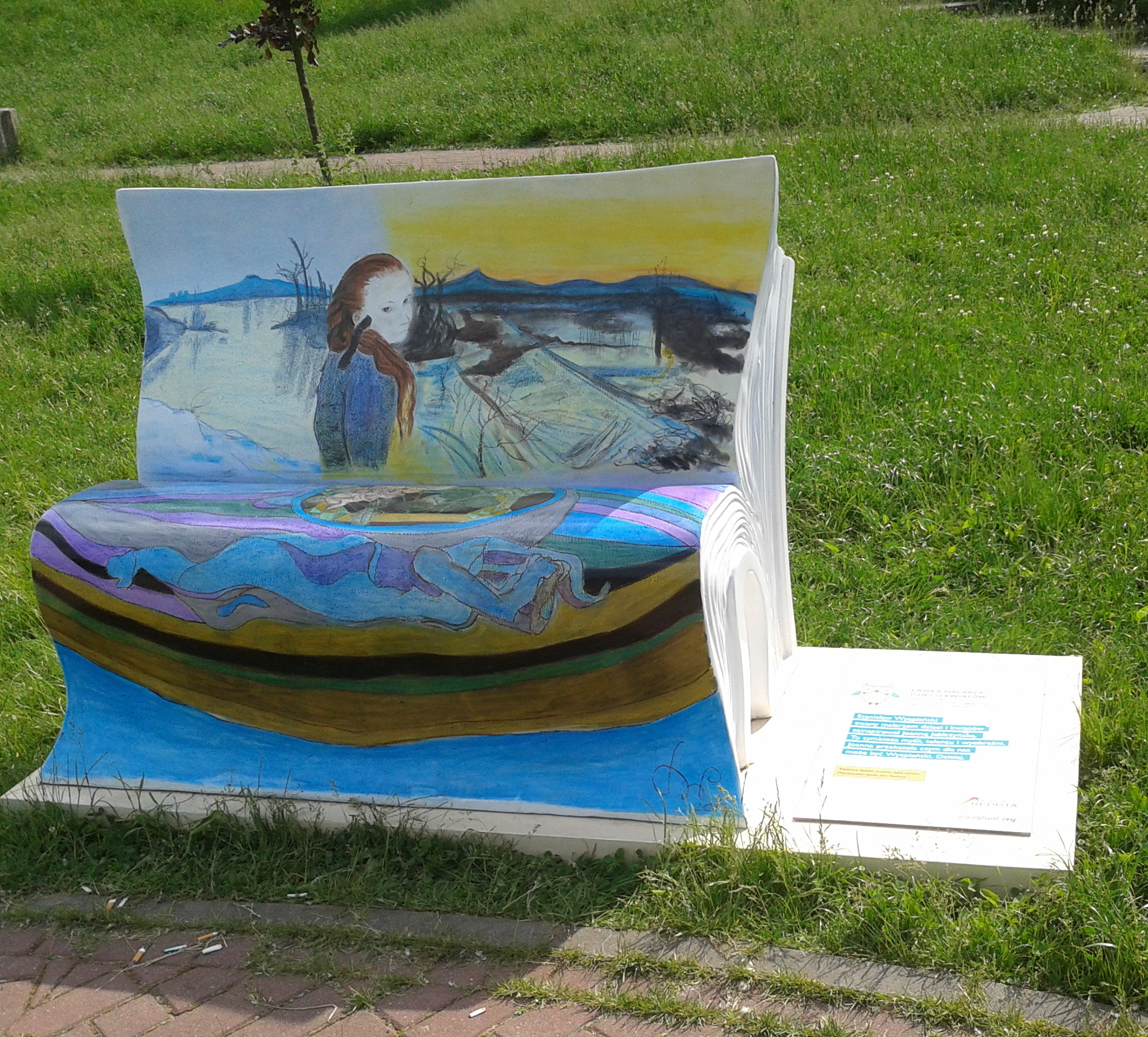 „Ławka malarza dzieci i kwiatów“. Jedna z ławek literackich Szlaku Literackiego fundacji . Park Szczęśliwicki. Lato 2017. Projekt: Joanna Jabłczyńska, inspiracja Stanisław Wyspiański.